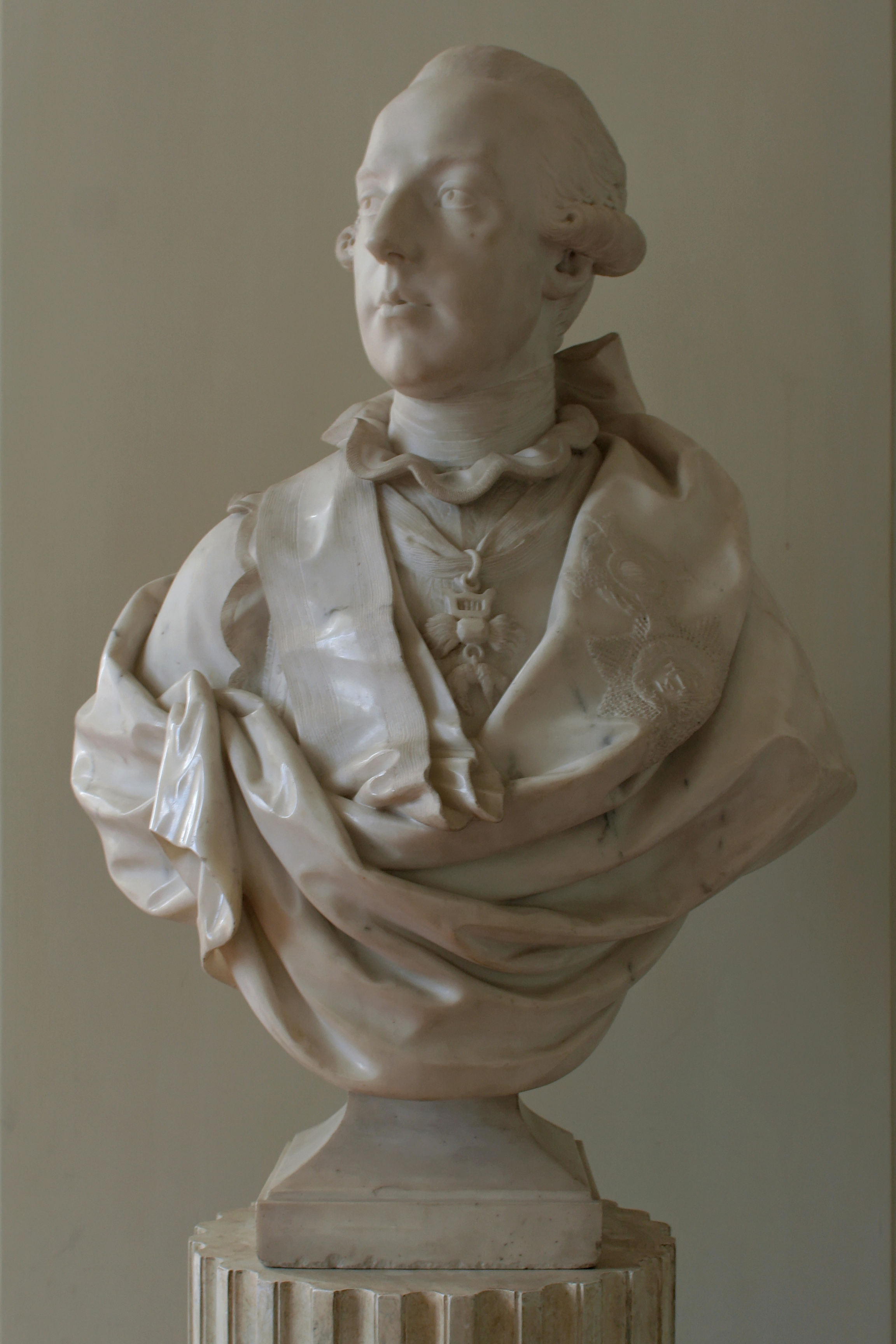 Antichambre du Petit Trianon, buste de Joseph II, sculpture sur marbre de Louis-Simon Boizot, 1777. Hauteur : 0,81 m. Numéro d'inventaire : MV2150